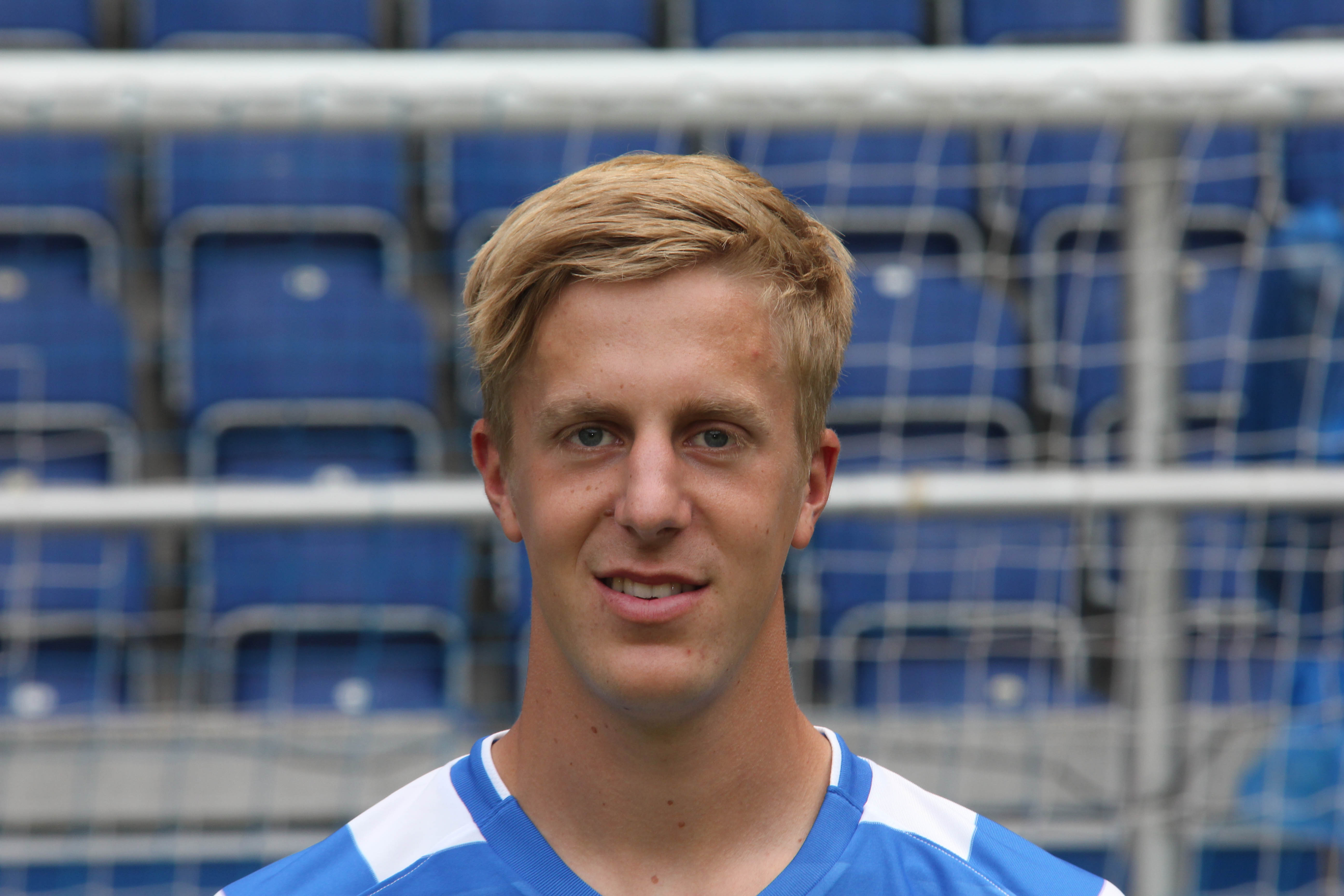 German footballer Stephan Hennen, MSV Duisburg